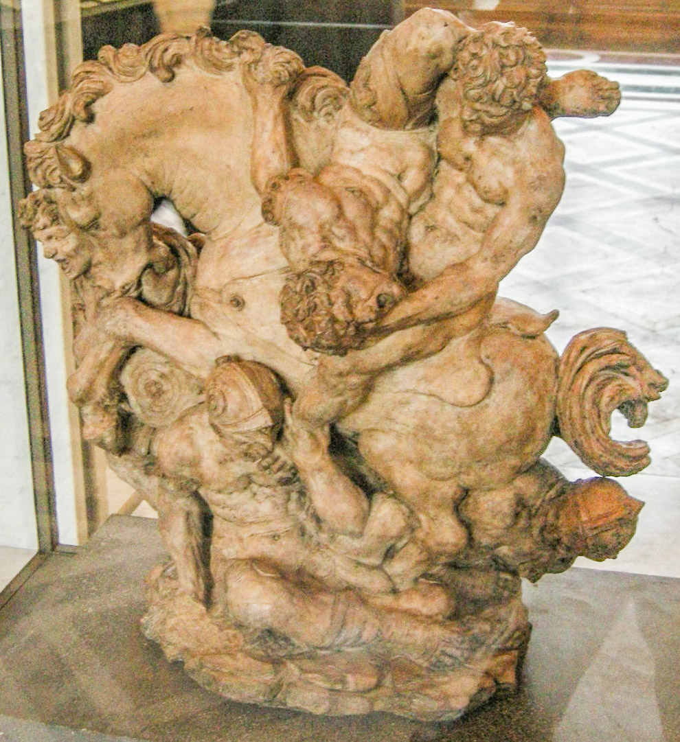 Gianfrancesco rustici, scena di combattimento 01.JPG